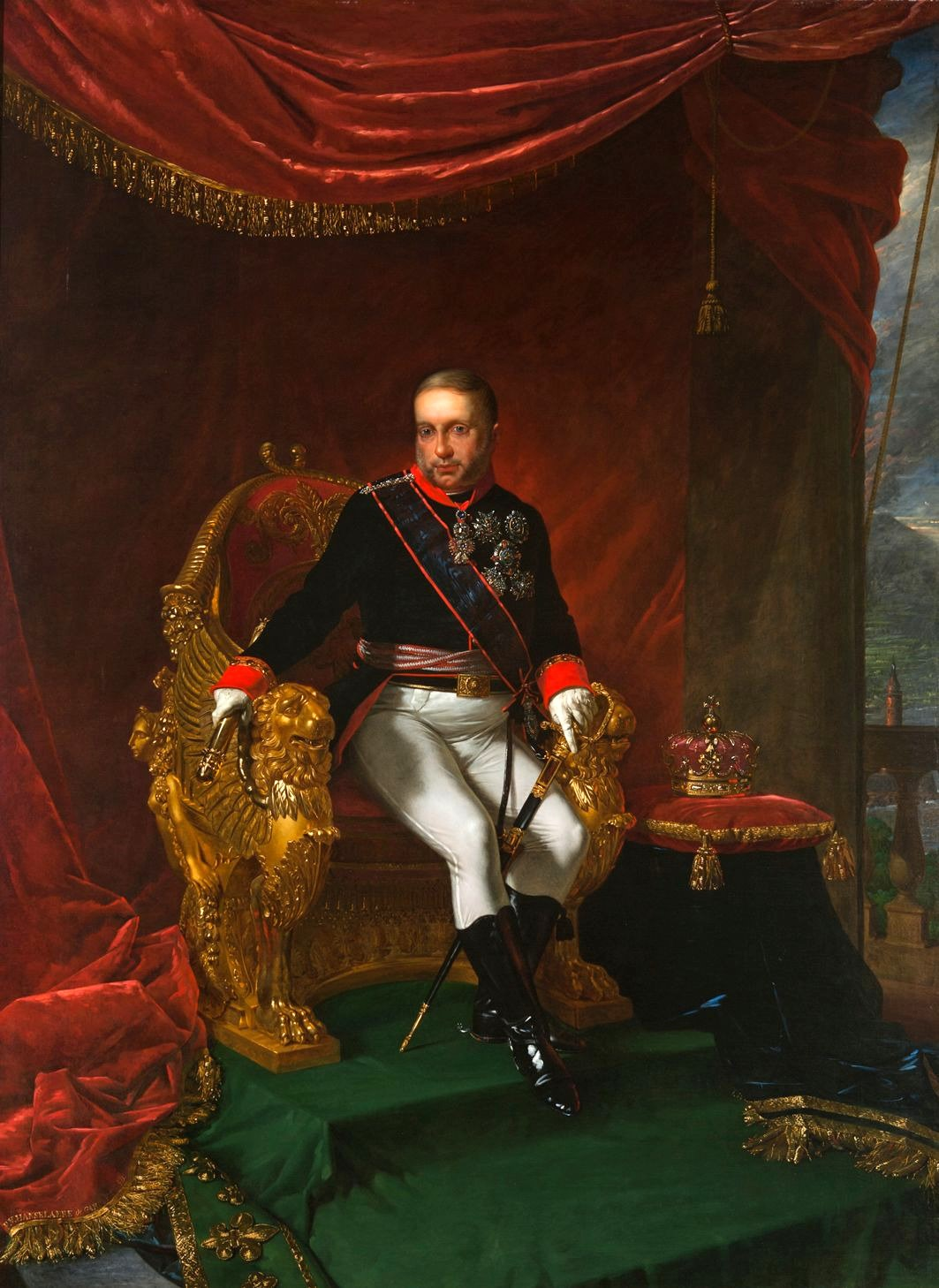 Ritratto di Francesco I delle Due Sicilie (1777-1830)